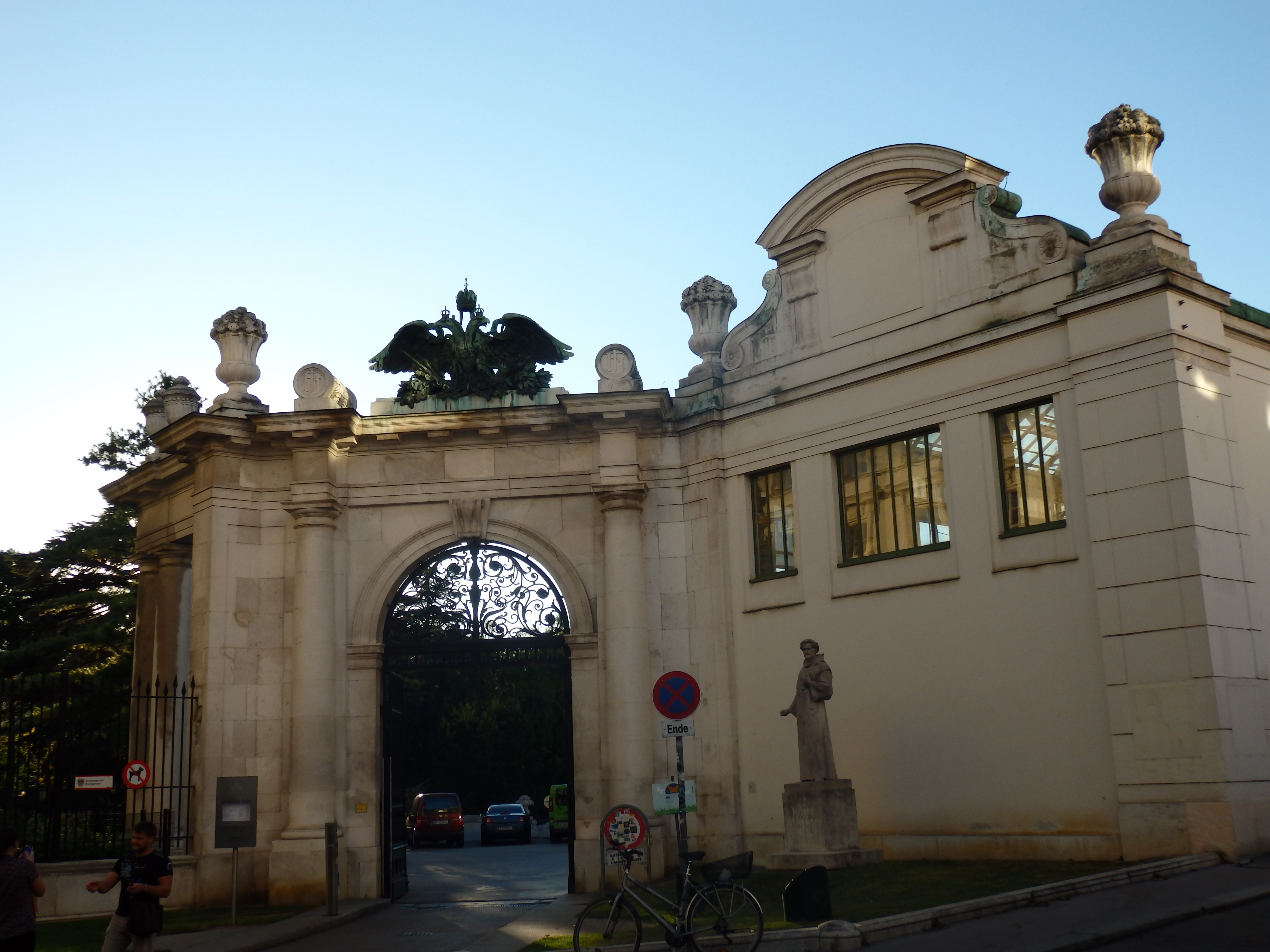 Burggartentor (1910) von Ludwig Baumann, Goethegasse, Wien-Innere Stadt